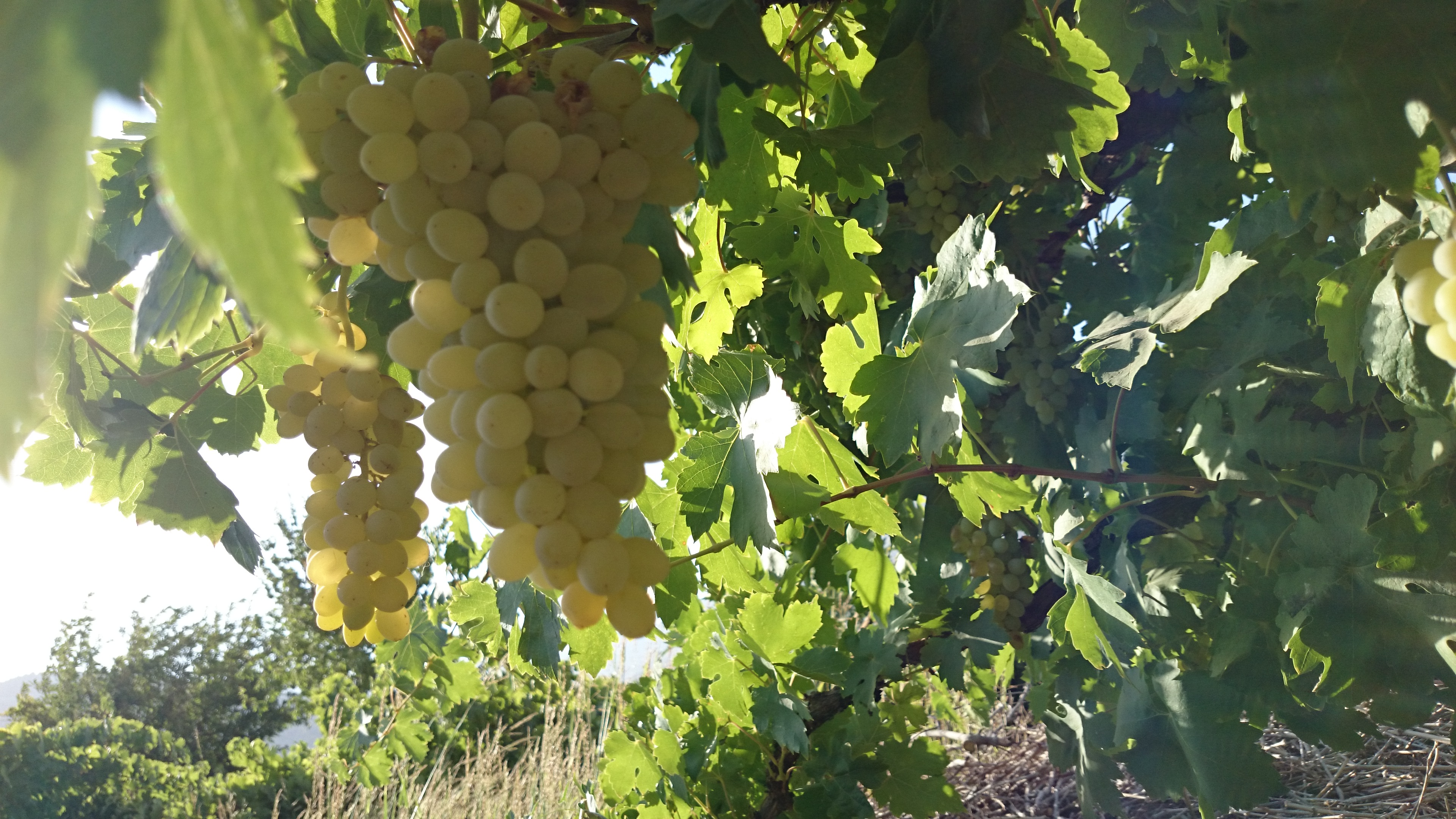 محصولات زراعی بانش